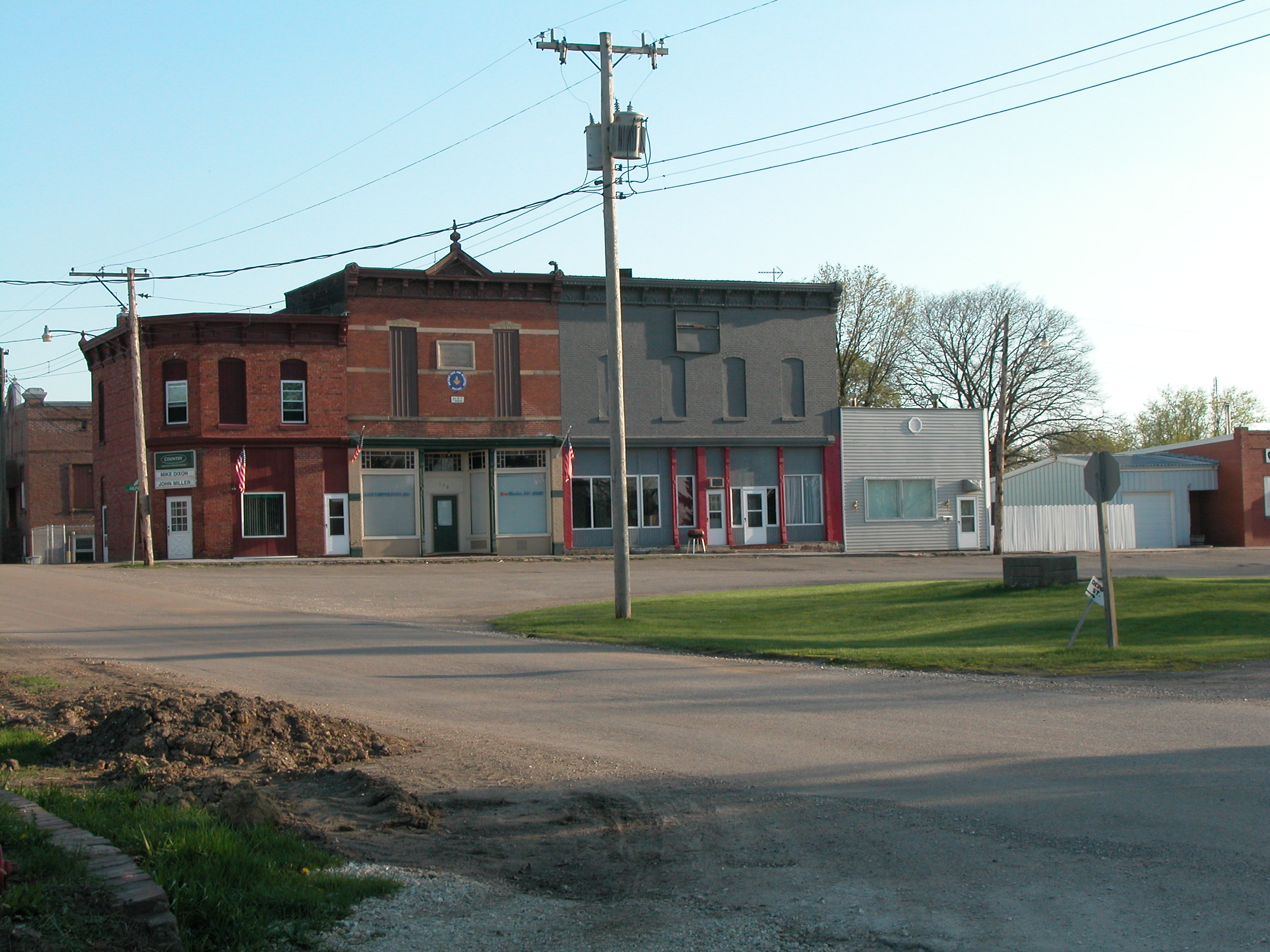 Oneida, Illinois